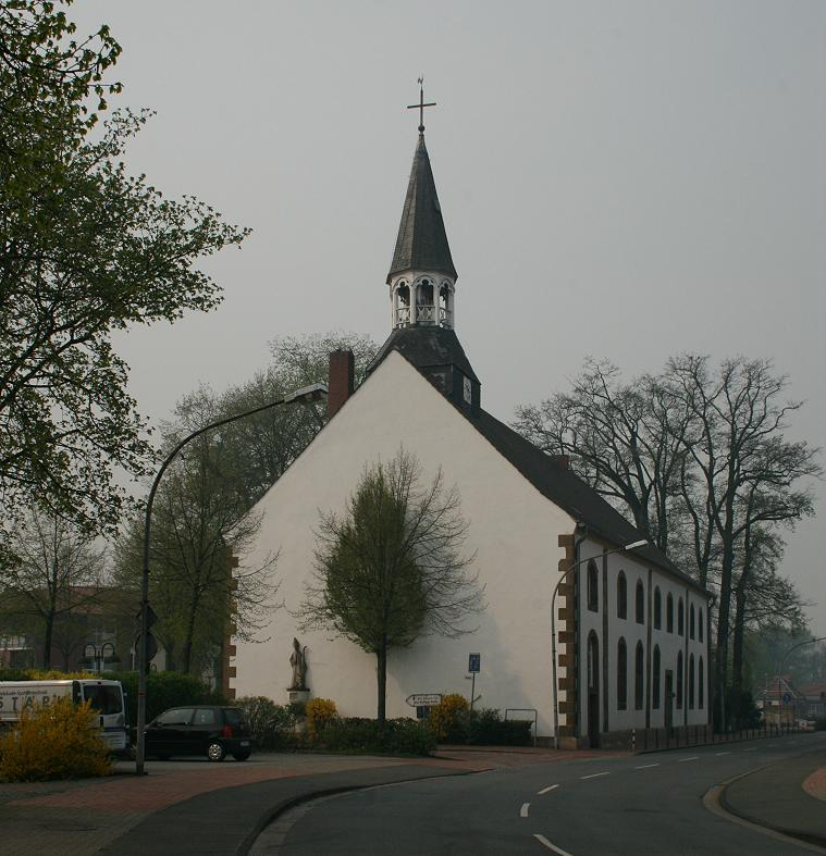 Dionysius-Jugendheim (“Dio”) Recke. Die frühere St.-Dionysius-Pfarrkirche an der Hopstener Straße (Landesstraße 599) dient heute Kindern und Jugendlichen als Treff. This is a photograph of an architectural monument.